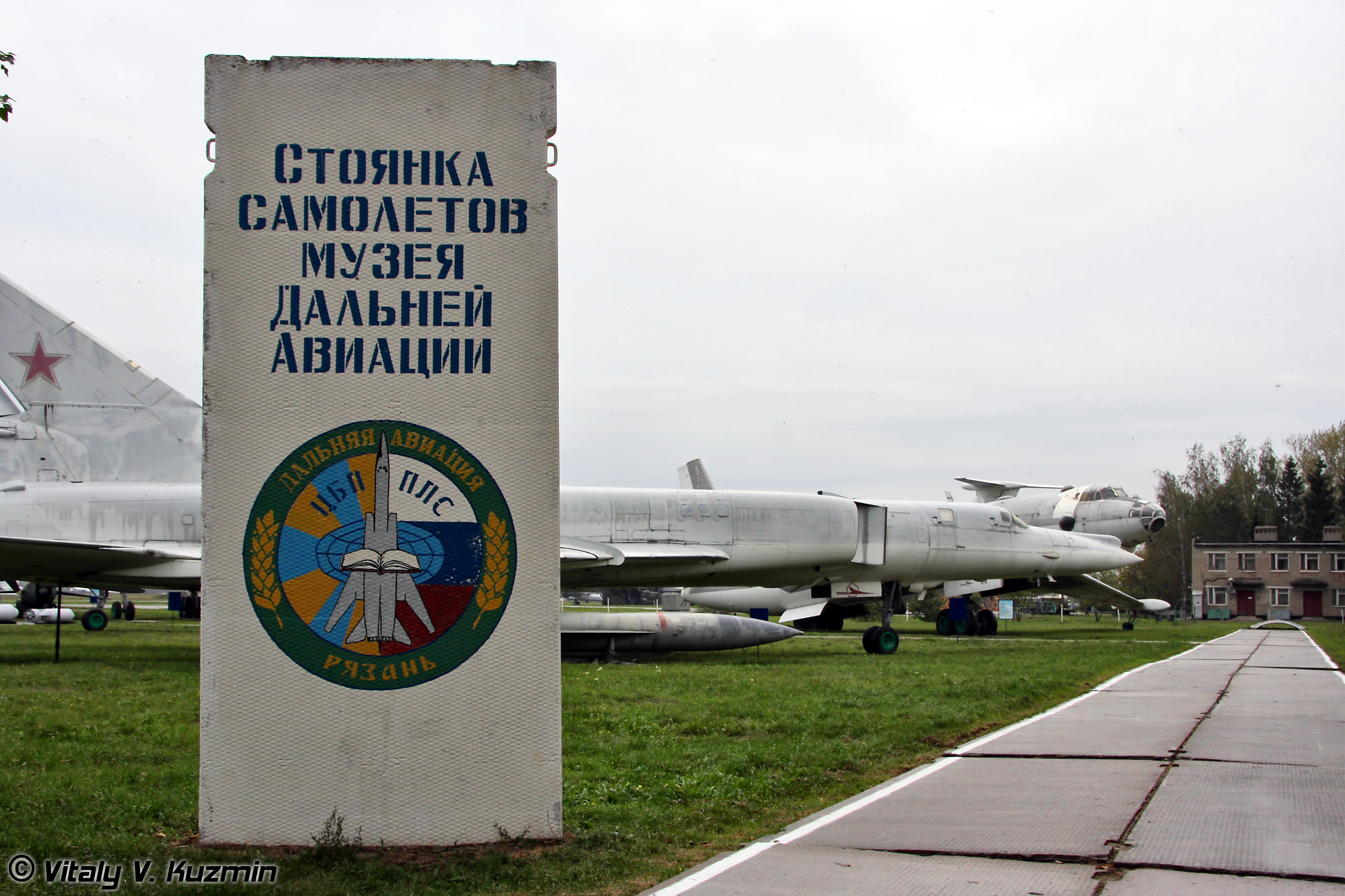 Музей дальней авиации, г.Рязань, гарнизон Дягилево